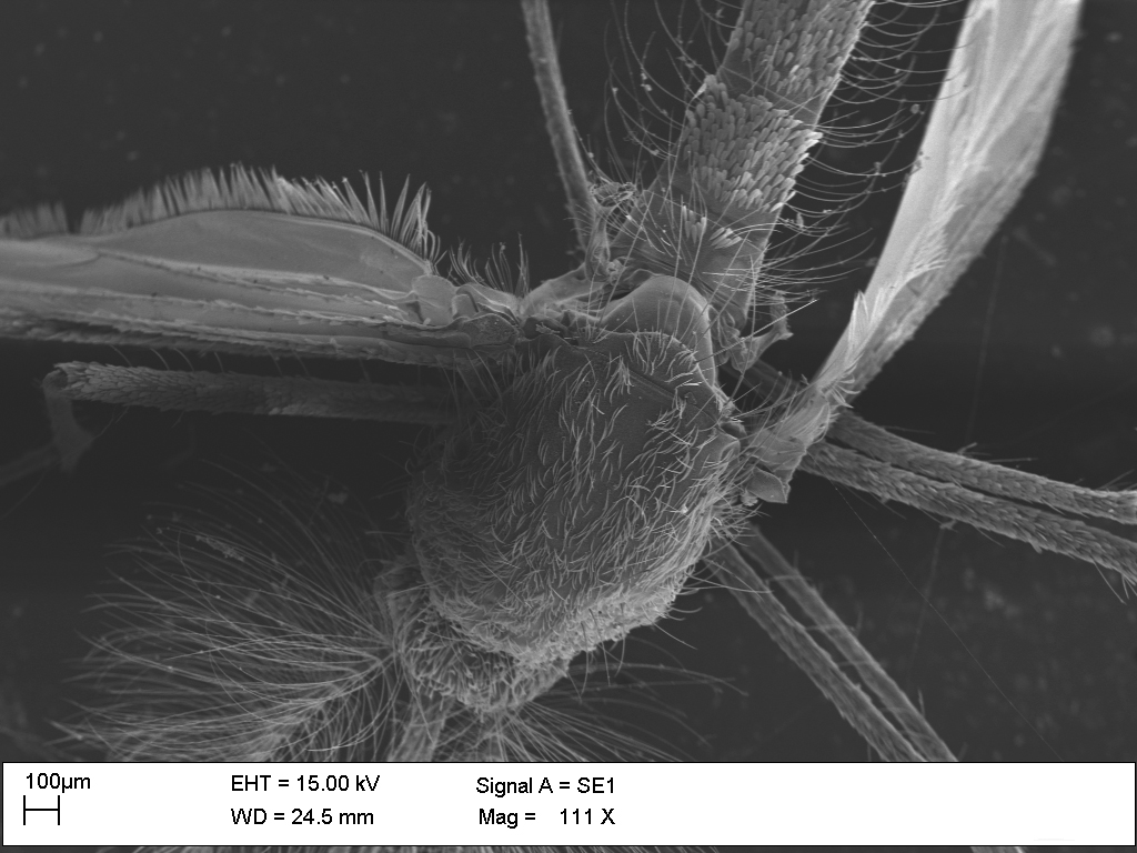 Immagine di una zanzara vista dall'alto registrata mediante SEM (microscopio elettronico a scansione). L'ingrandimento risulta di 111X